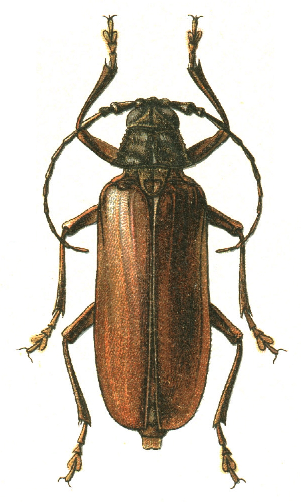 Macrotoma scutellaris = Prinobius myardi